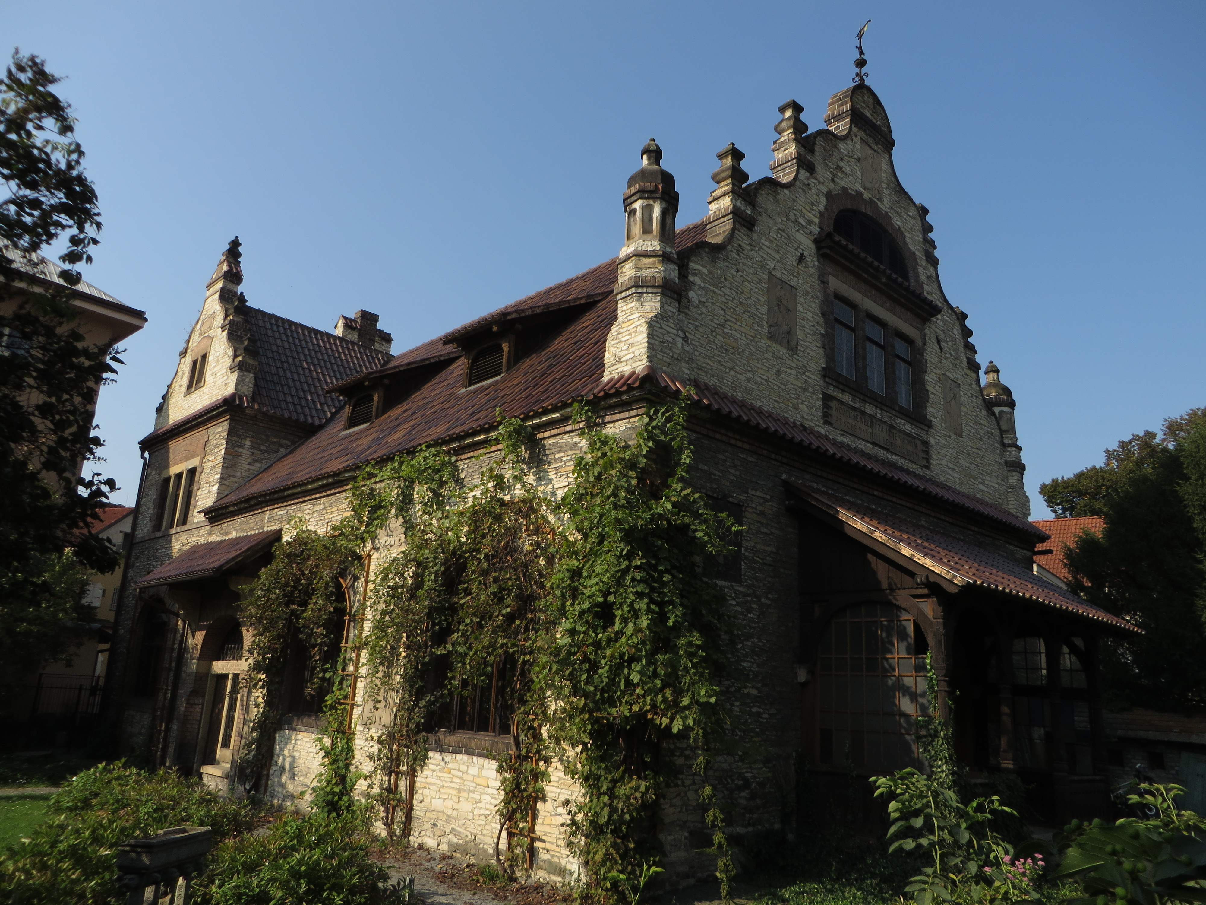 Obereignerova vila, Havlíčkova 1, Poděbrady III, Poděbrady.